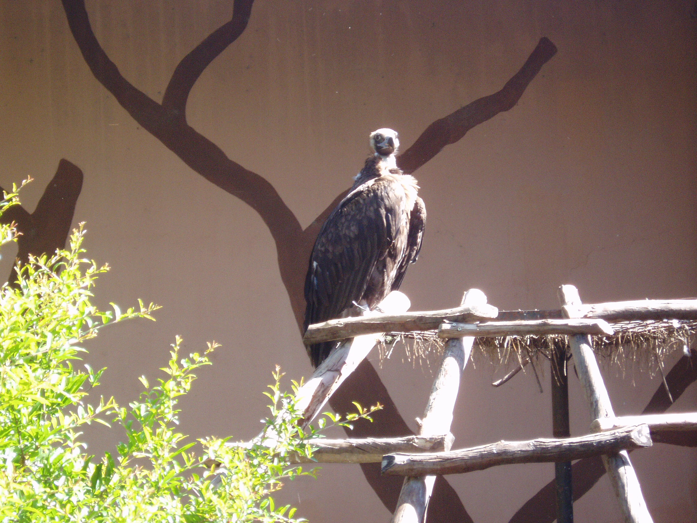 Buitre negro (Aegypius monachus) en el zoo de Jerez de la Frontera, España.